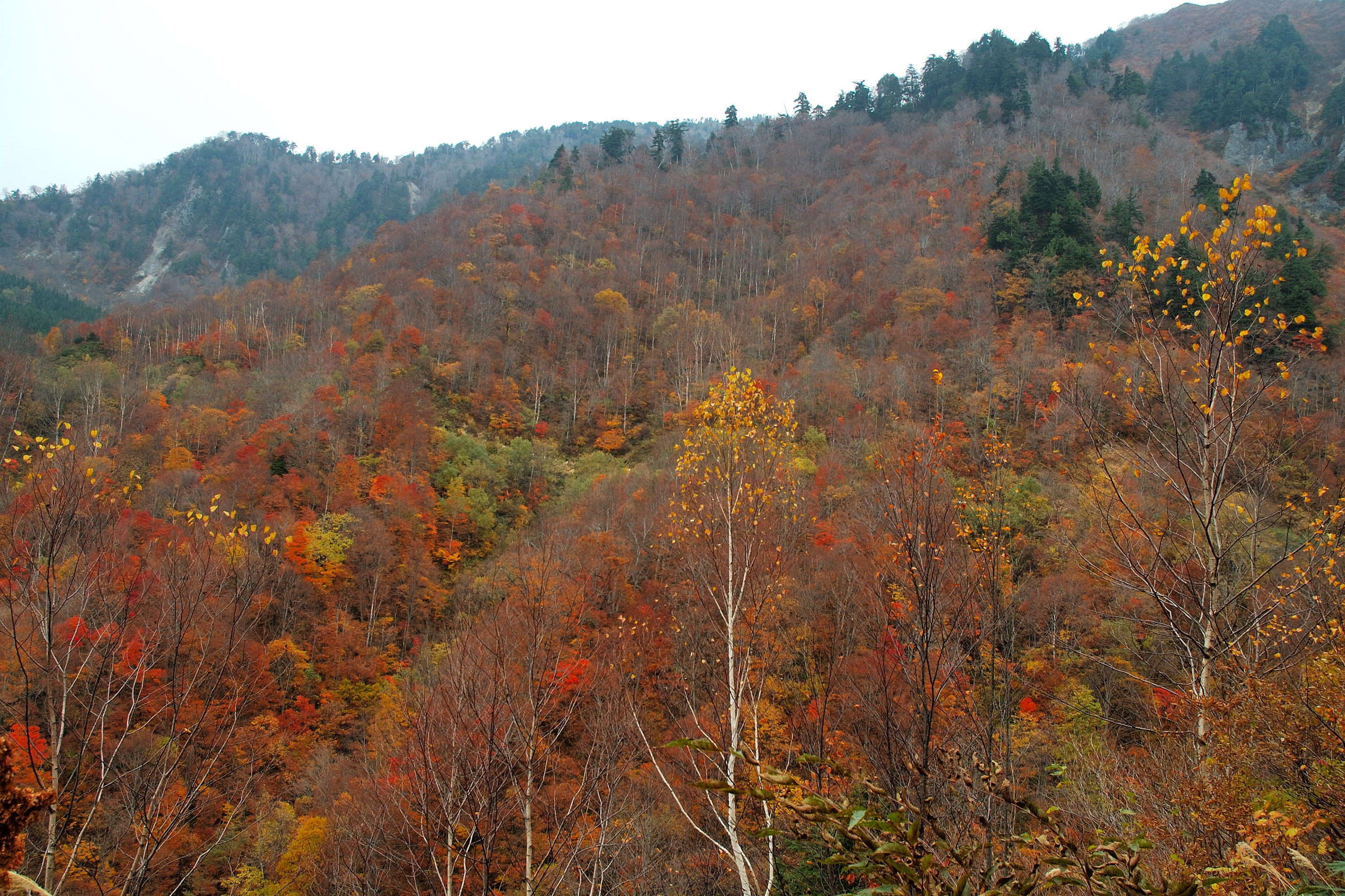 Akiyamago (秋山郷, one of 日本の秘境100選)